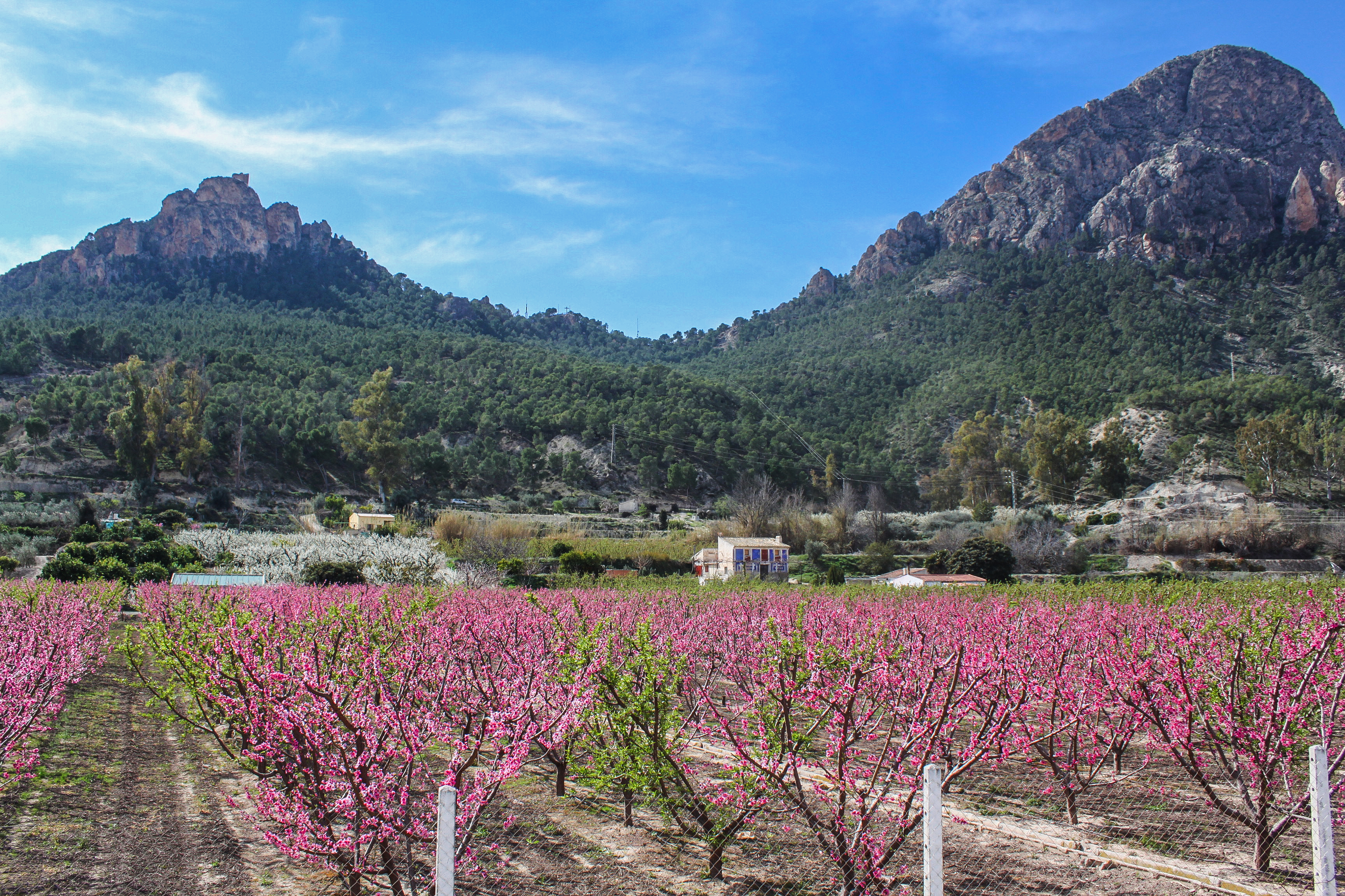 Frutales en flor en la huerta de Cieza (Región de Murcia, España)